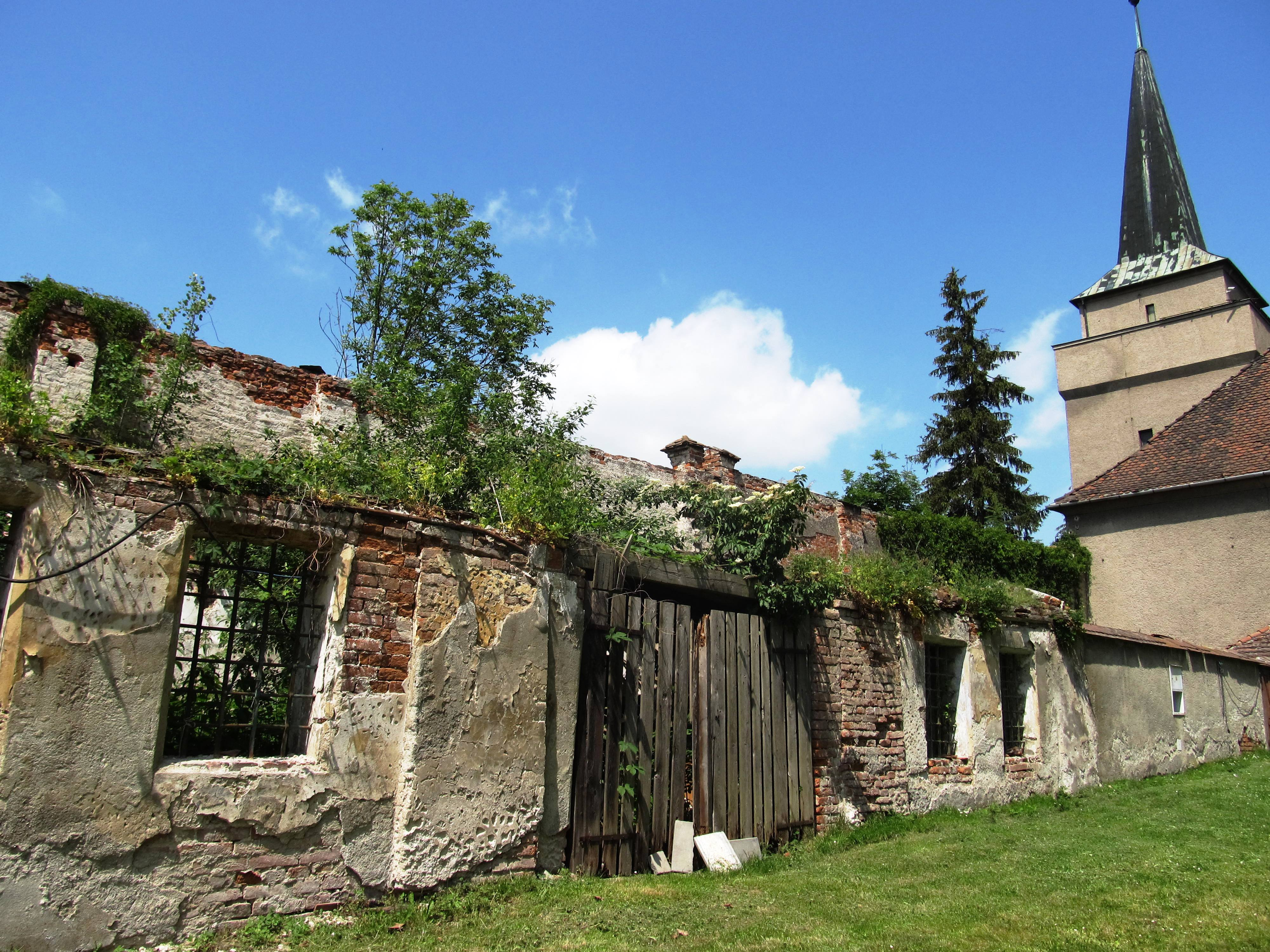 Tovačov zámek